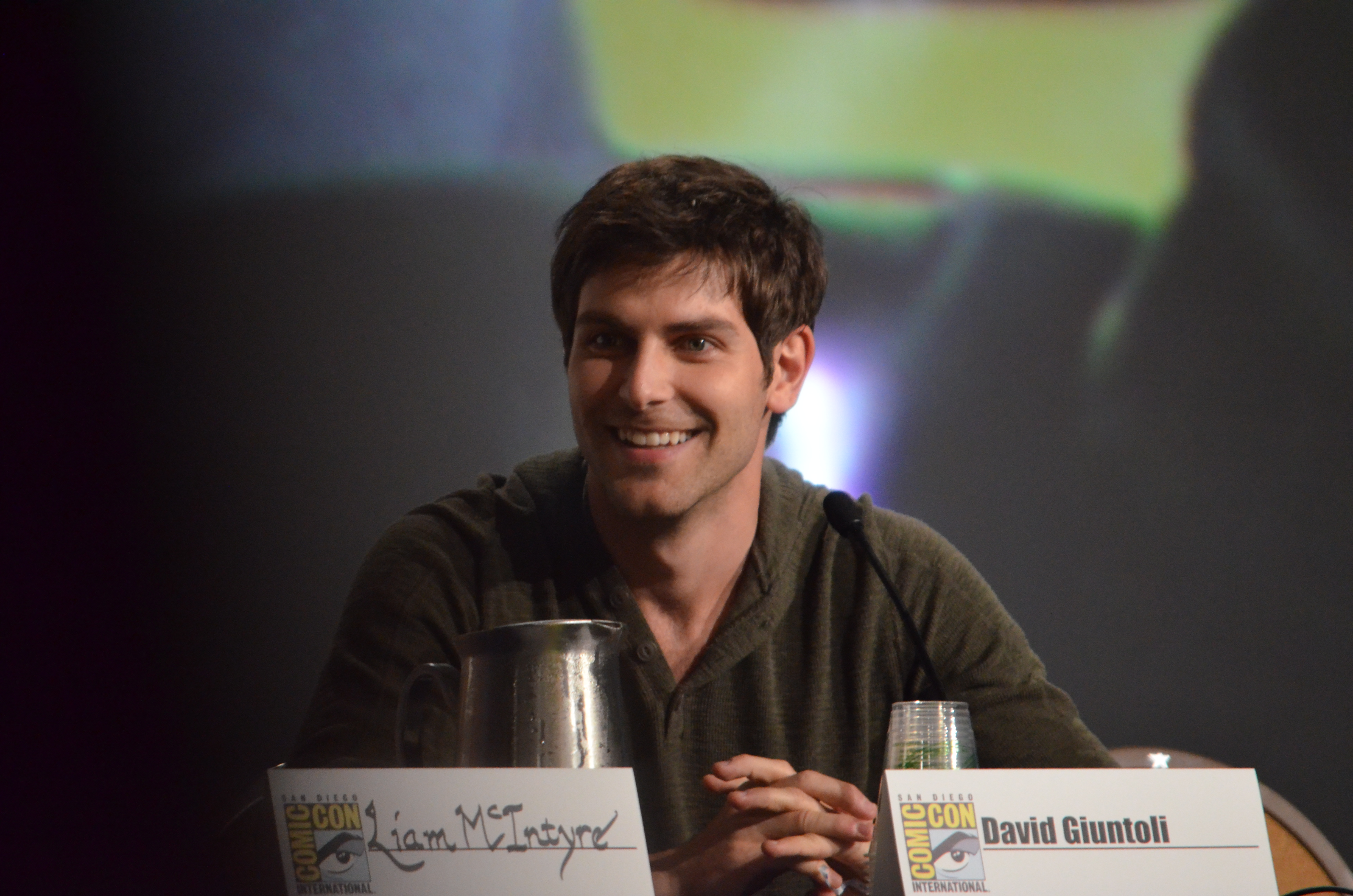 David Giuntoli at Comic-Con